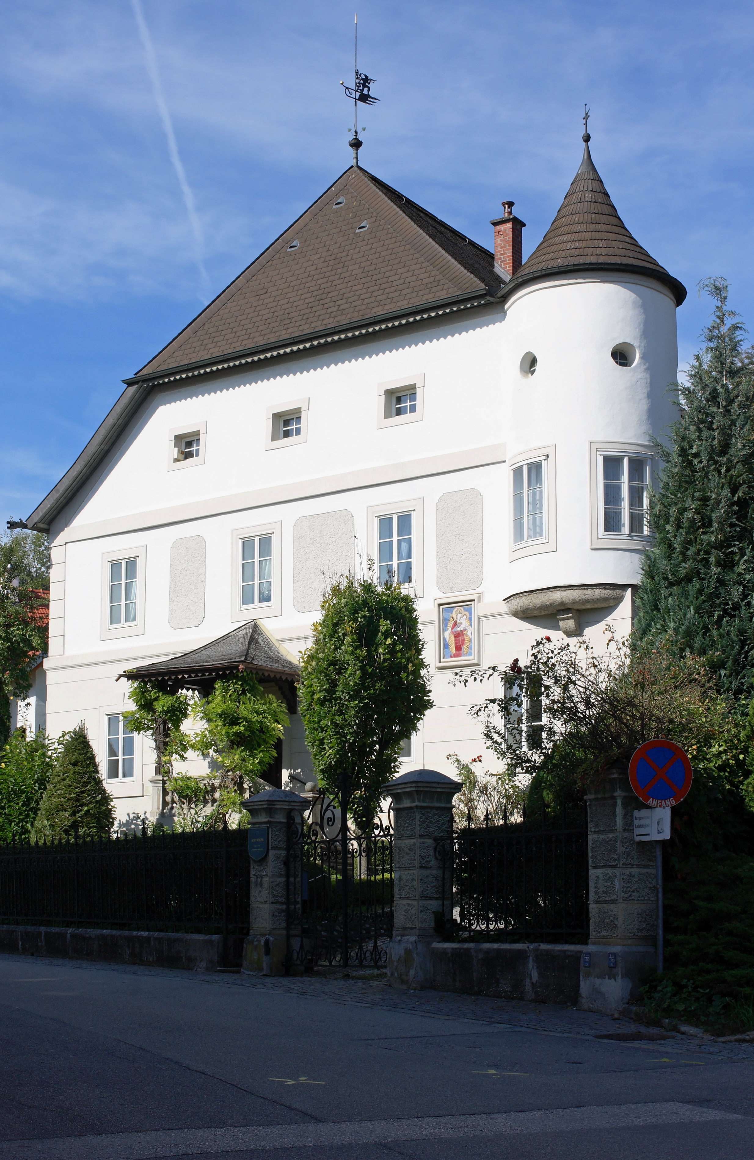 Das Aichetschlössl in der Steyrer Sierningerstraße